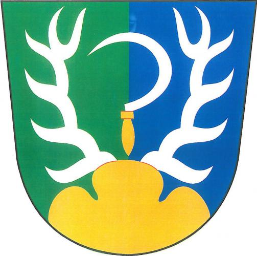 znak obce Rantířov